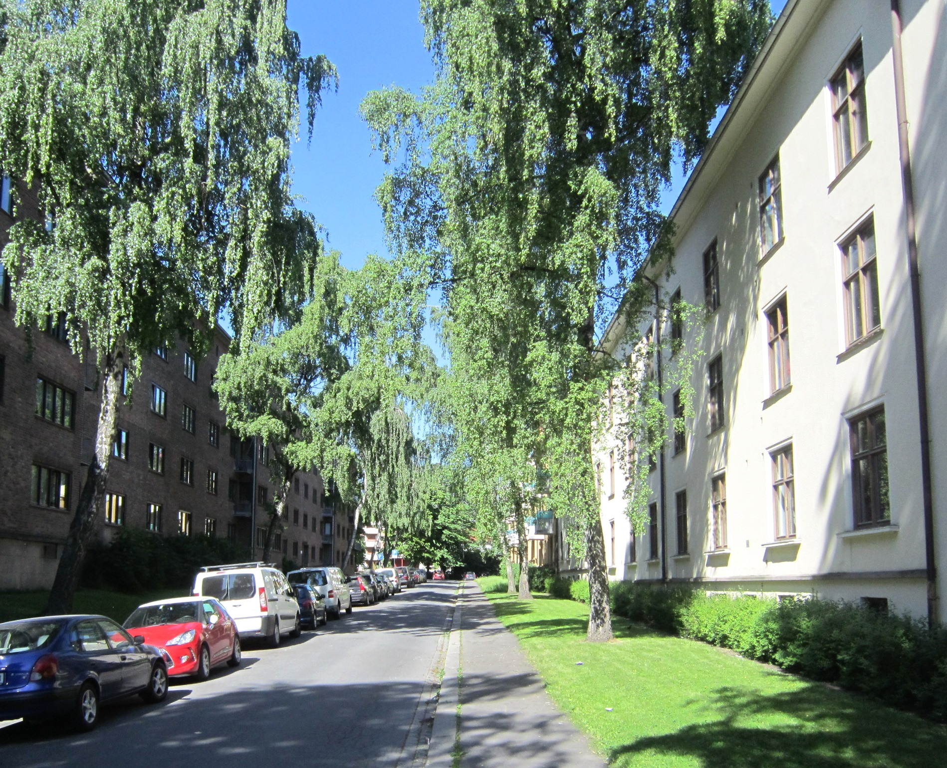 Sigurd Lies gate på Torshov